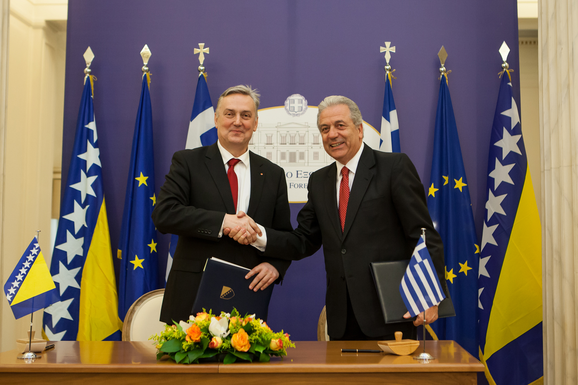 Την Τετάρτη 24 Απριλίου 2013, ο Υπουργός Εξωτερικών, Δημήτρης Αβραμόπουλος συναντήθηκε στο Υπουργείο Εξωτερικών με τον Υπουργό Εξωτερικών της Βοσνίας και Ερζεγοβίνης κ. Zlatko Lagumdzija, ο οποίος πραγματοποιεί επίσκεψη στη χώρα μας.